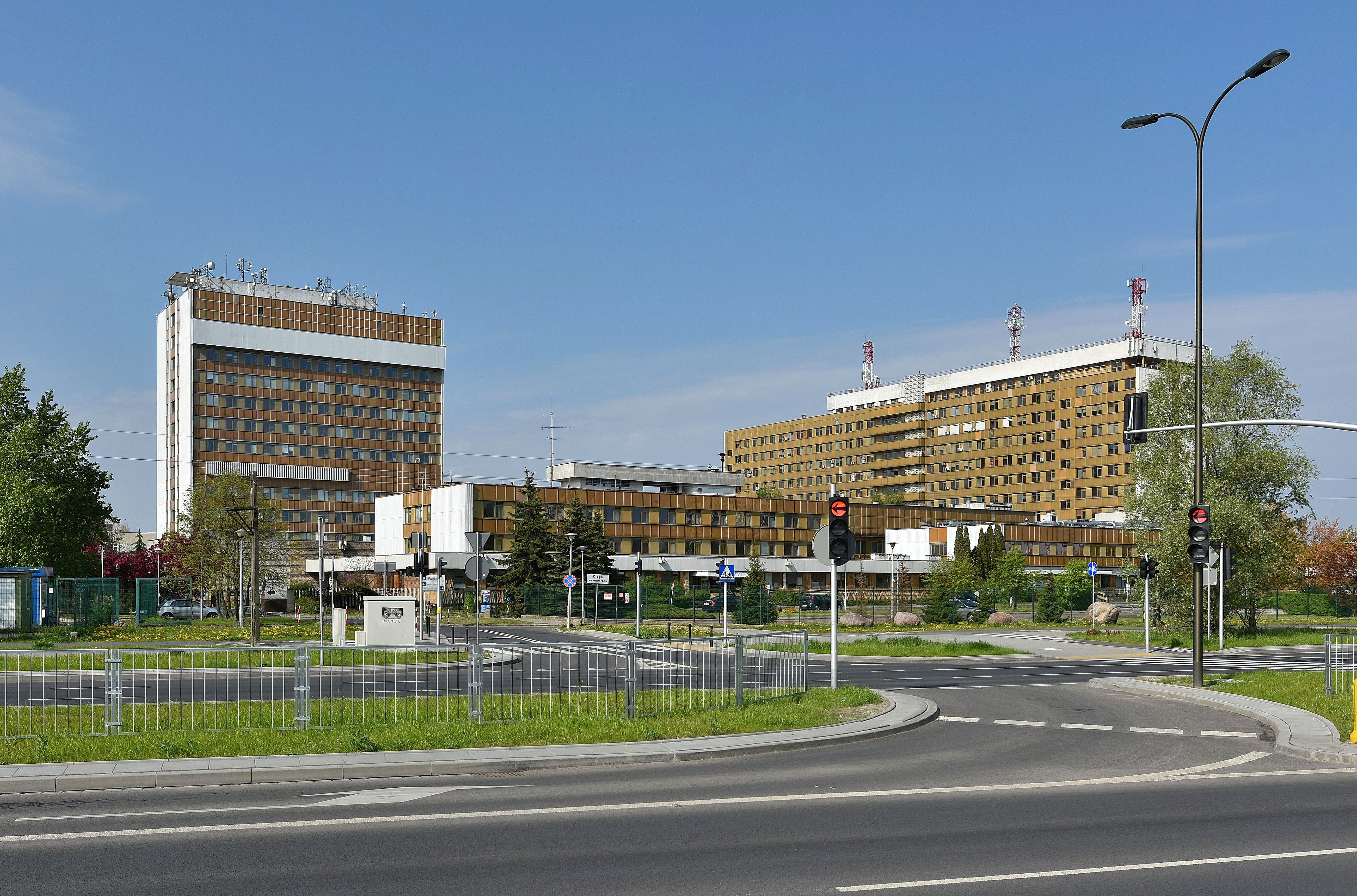 Centrum Onkologii w Warszawie, widok z ulicy rotm. Pileckiego